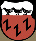 Wappen der Burggrafen von Stromberg in der heutigen Fassung